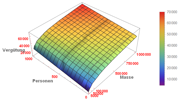 Vergütung in Insolvenzverfahren in Abhängigkeit von der Masse und den Personen